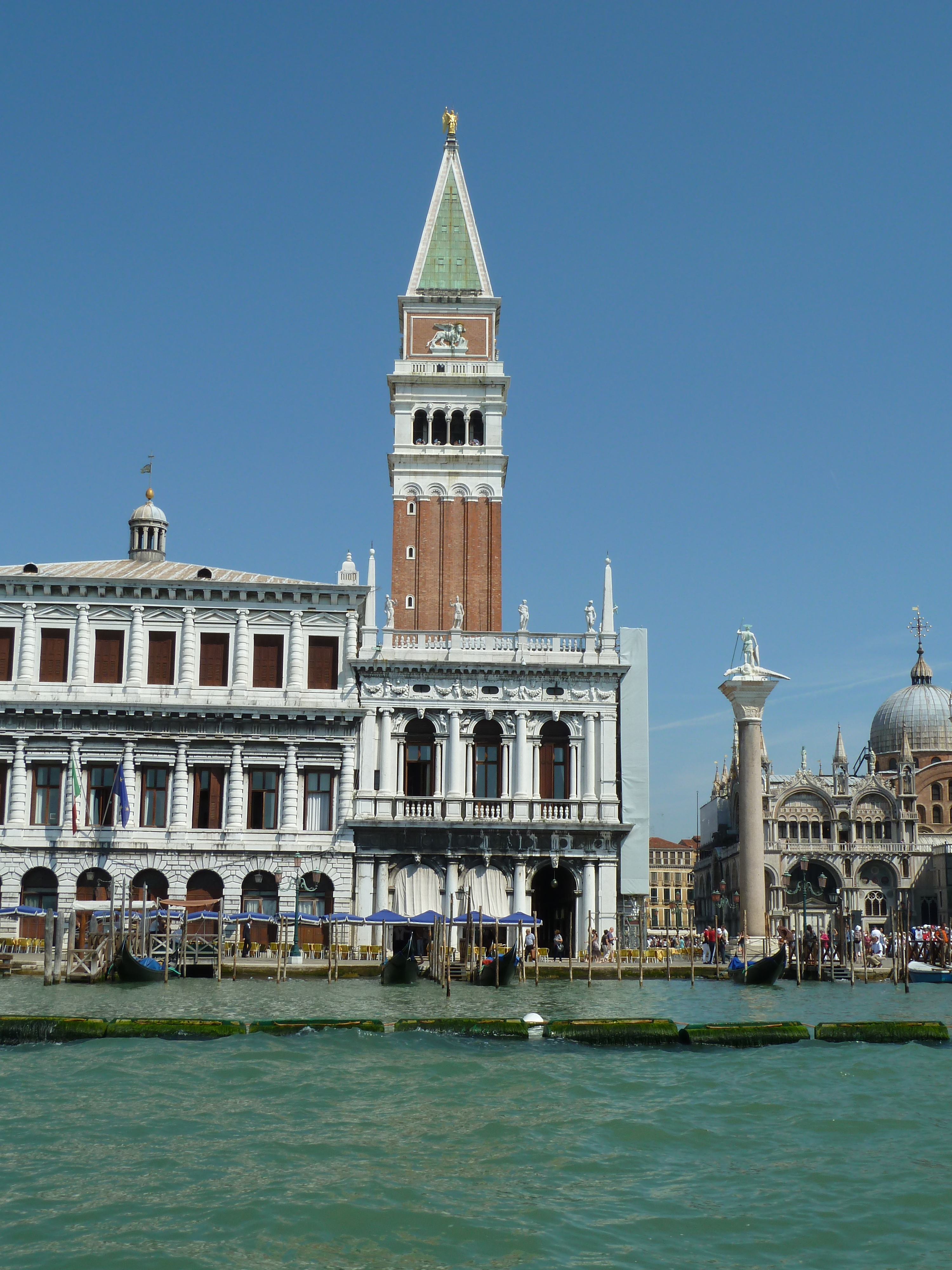 Zecca (Venice)